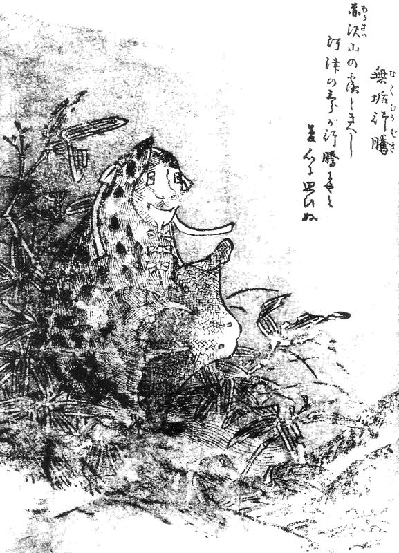 Mukukabaki (無垢行騰) from the Gazu Hyakki Tsurezure Bukuro (百器徒然袋)